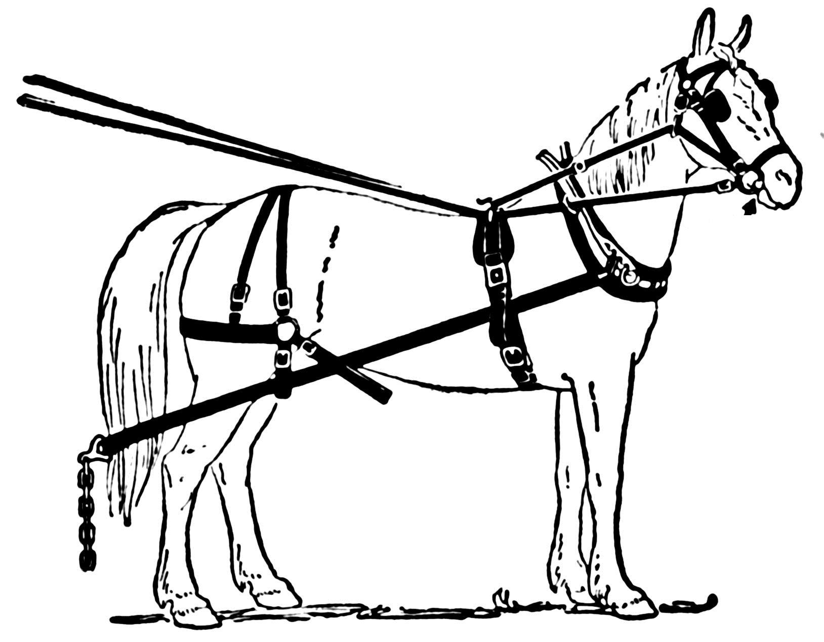 Figura de um encilhamento de um cavalo. Adaptado de File:Arreus del cavall-1.jpg.